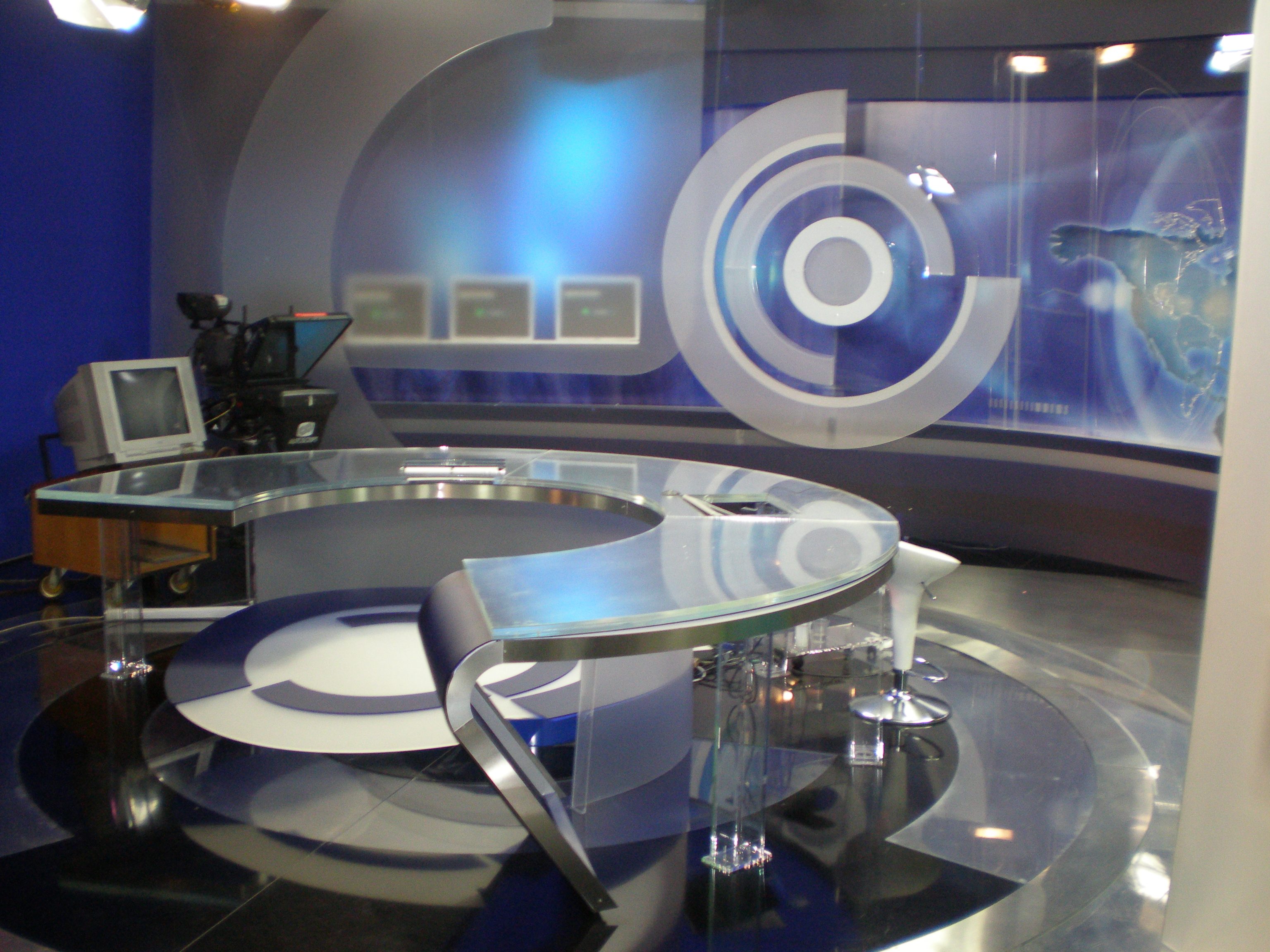 Studio Dnevnika HRT-a